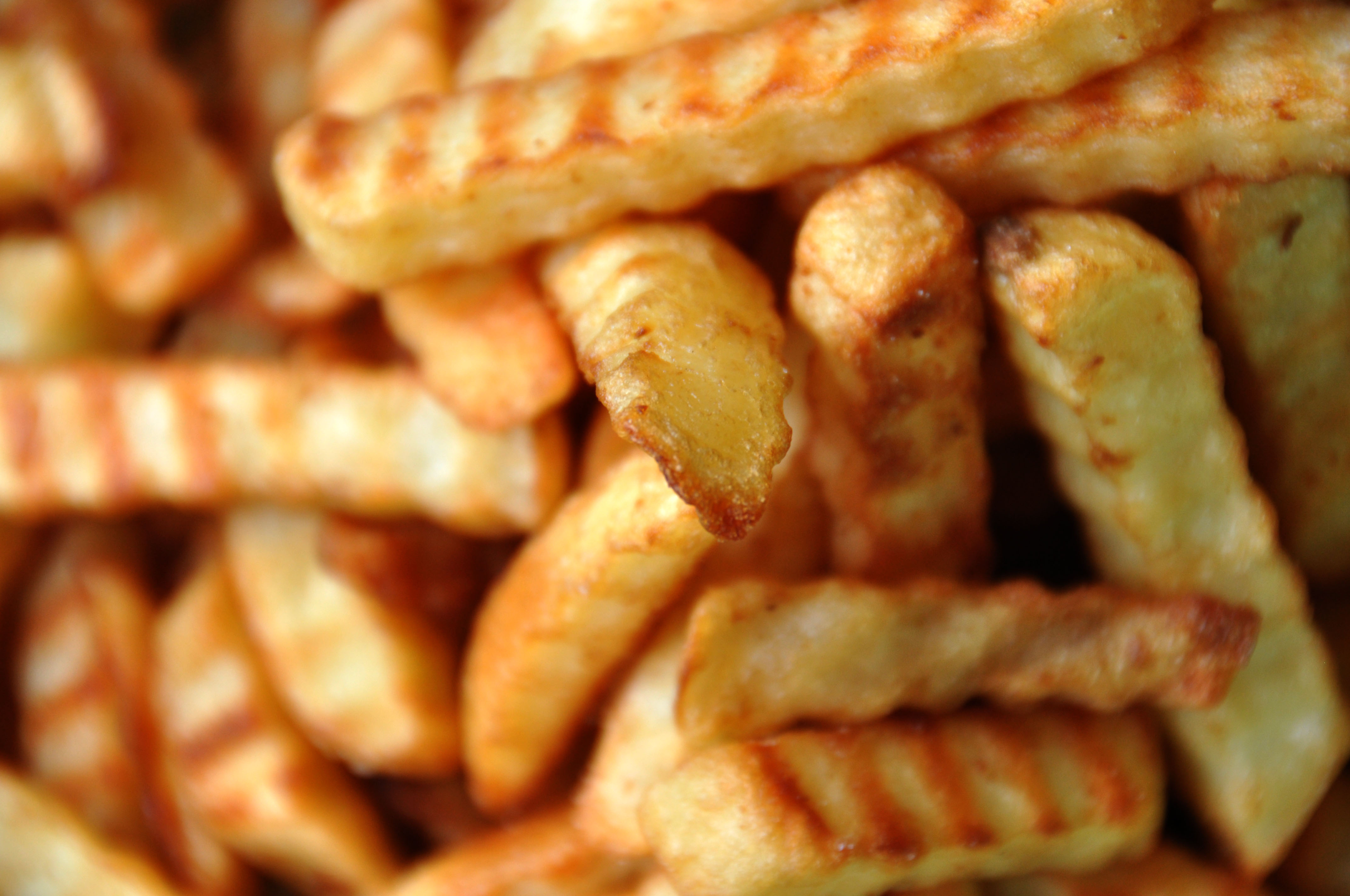 Pommes frites